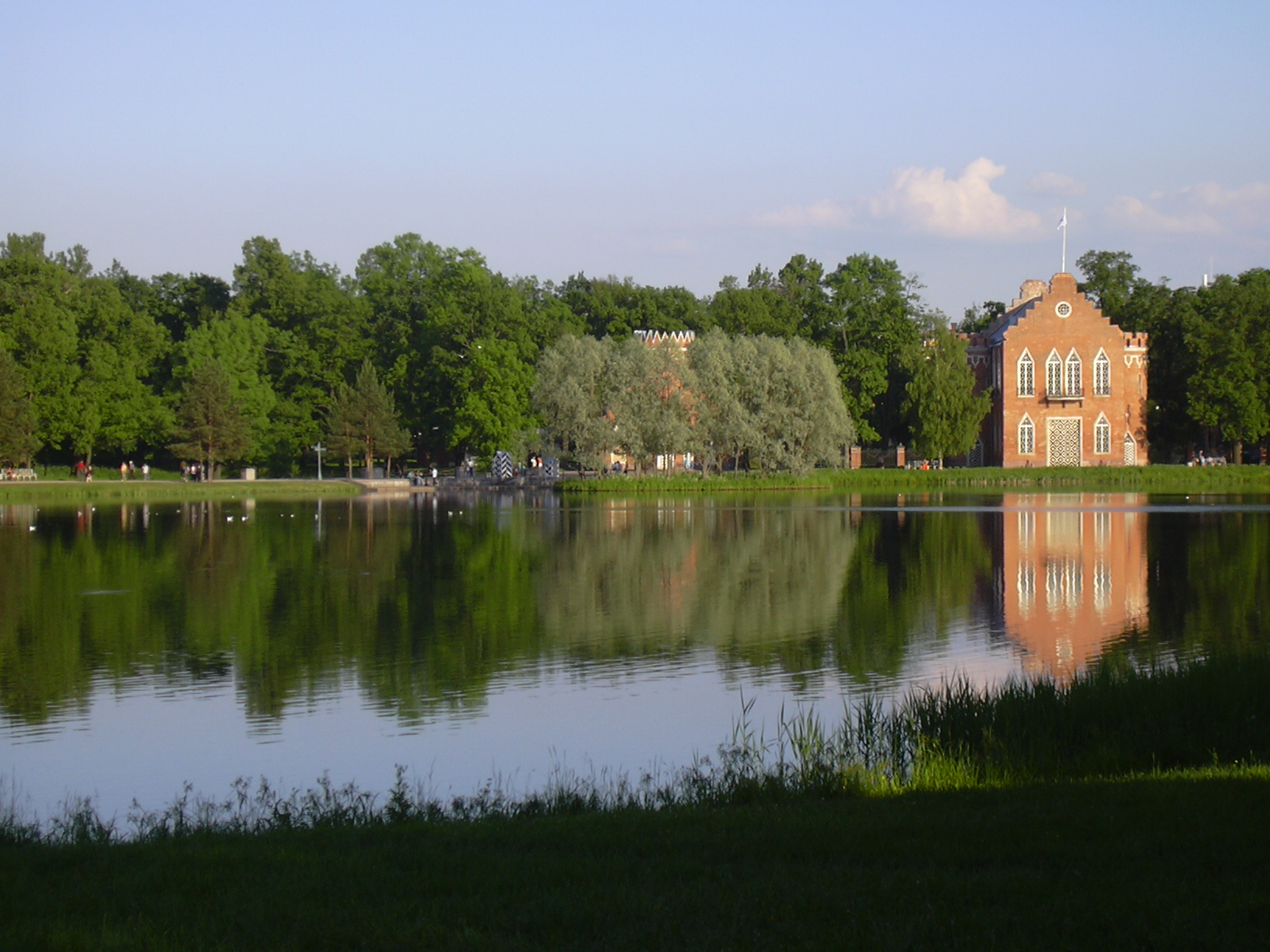 Admiralteystvo (Catharine park, Tsarskoye Selo, St.Petersburg, Russia)